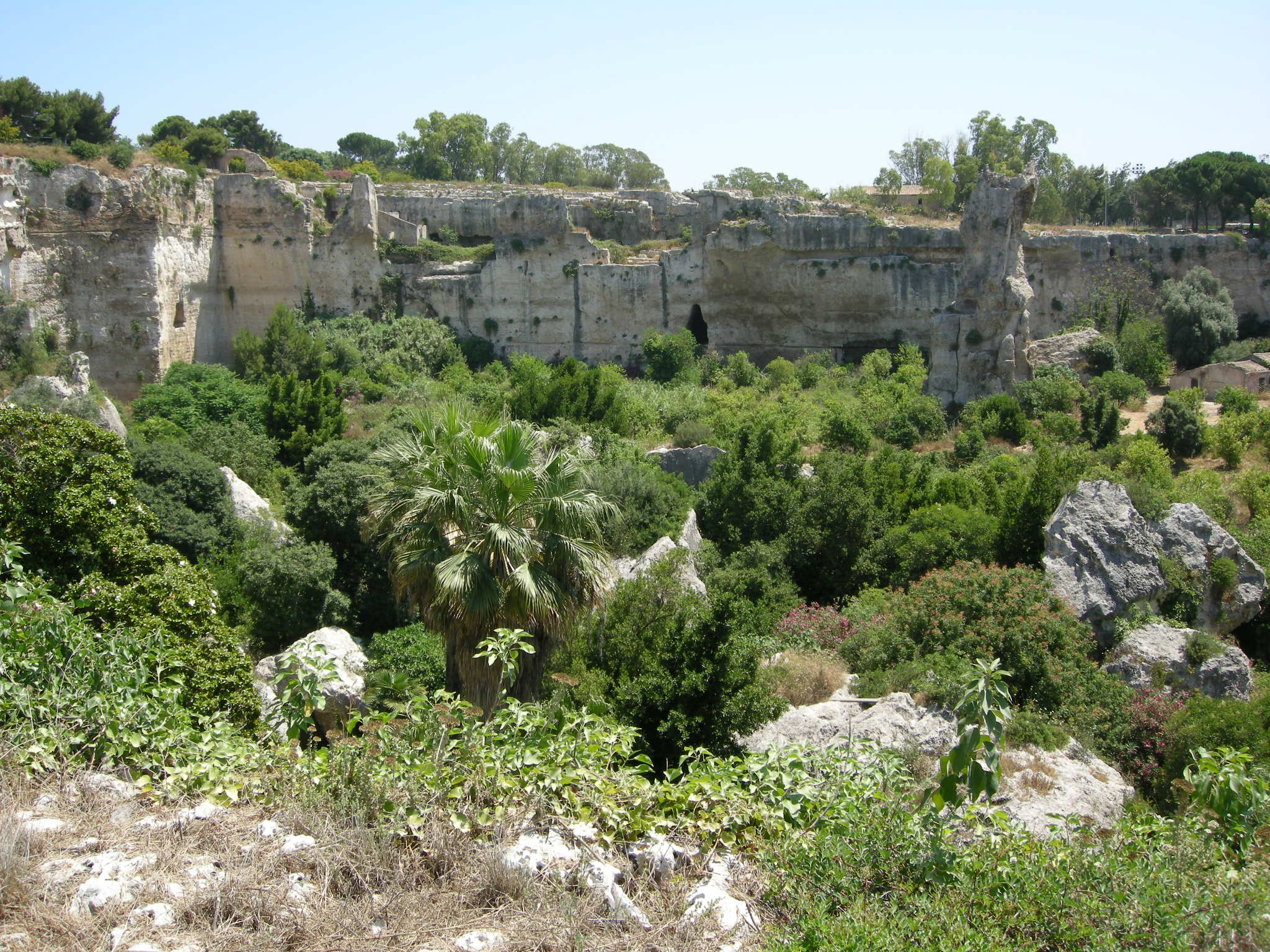 Siracusa, neapolis, latomia del paradiso